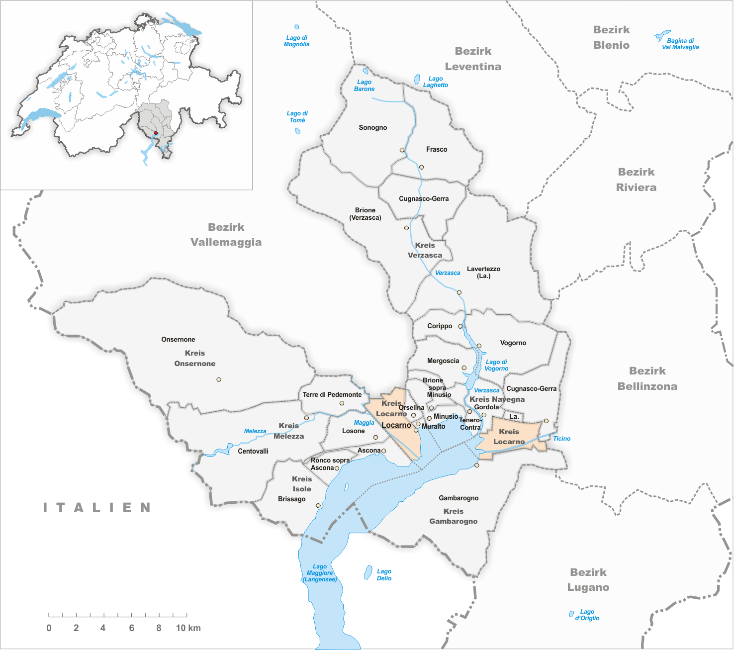 Municipality Locarno